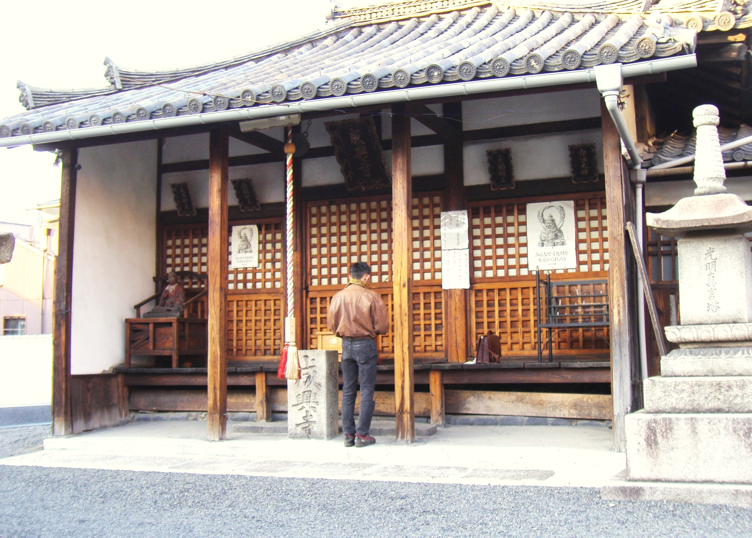 Jokoji Temple : A historical temple in Kyoto Japan